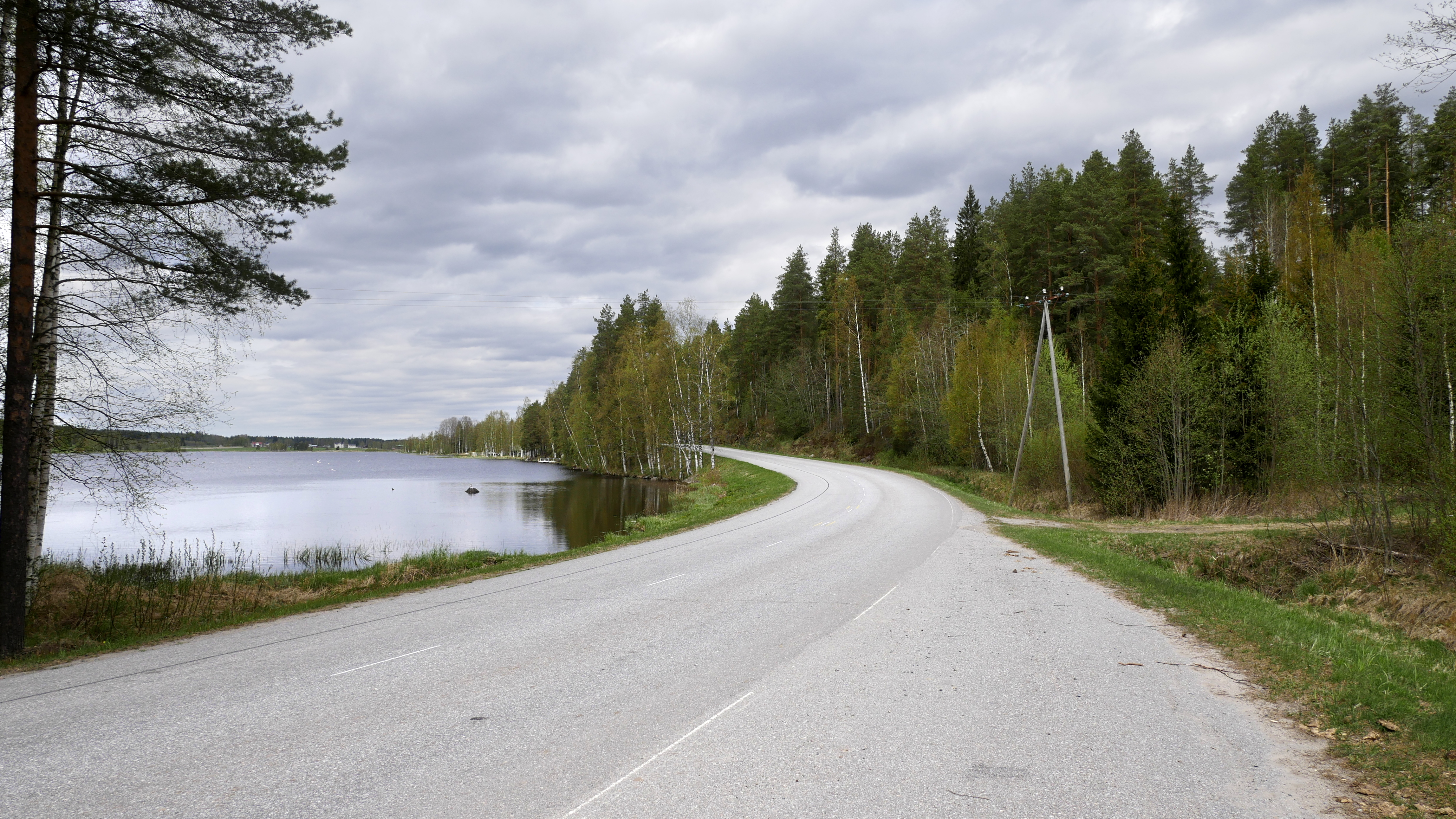 Paalijärventietä Alajärvellä, kuvassa vasemmalla Paalijärveä.